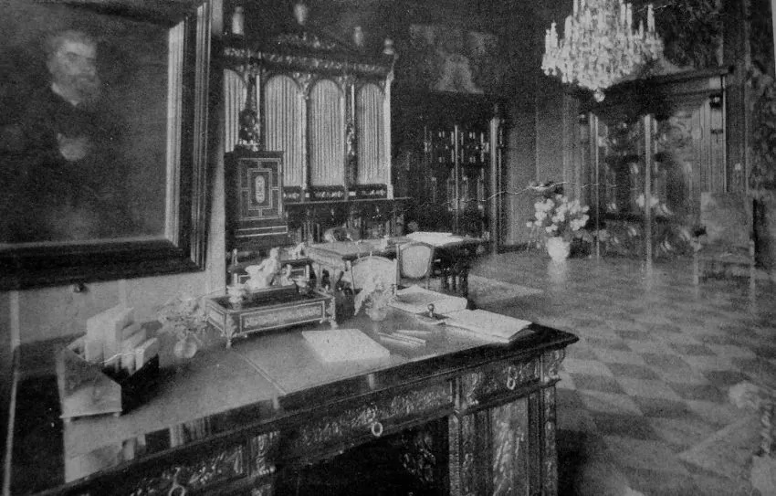 Fotografia z ok. 1908 roku przedstawiająca wnętrze gabinetu książęcego w pałacu w Reptach, reprodukcja.